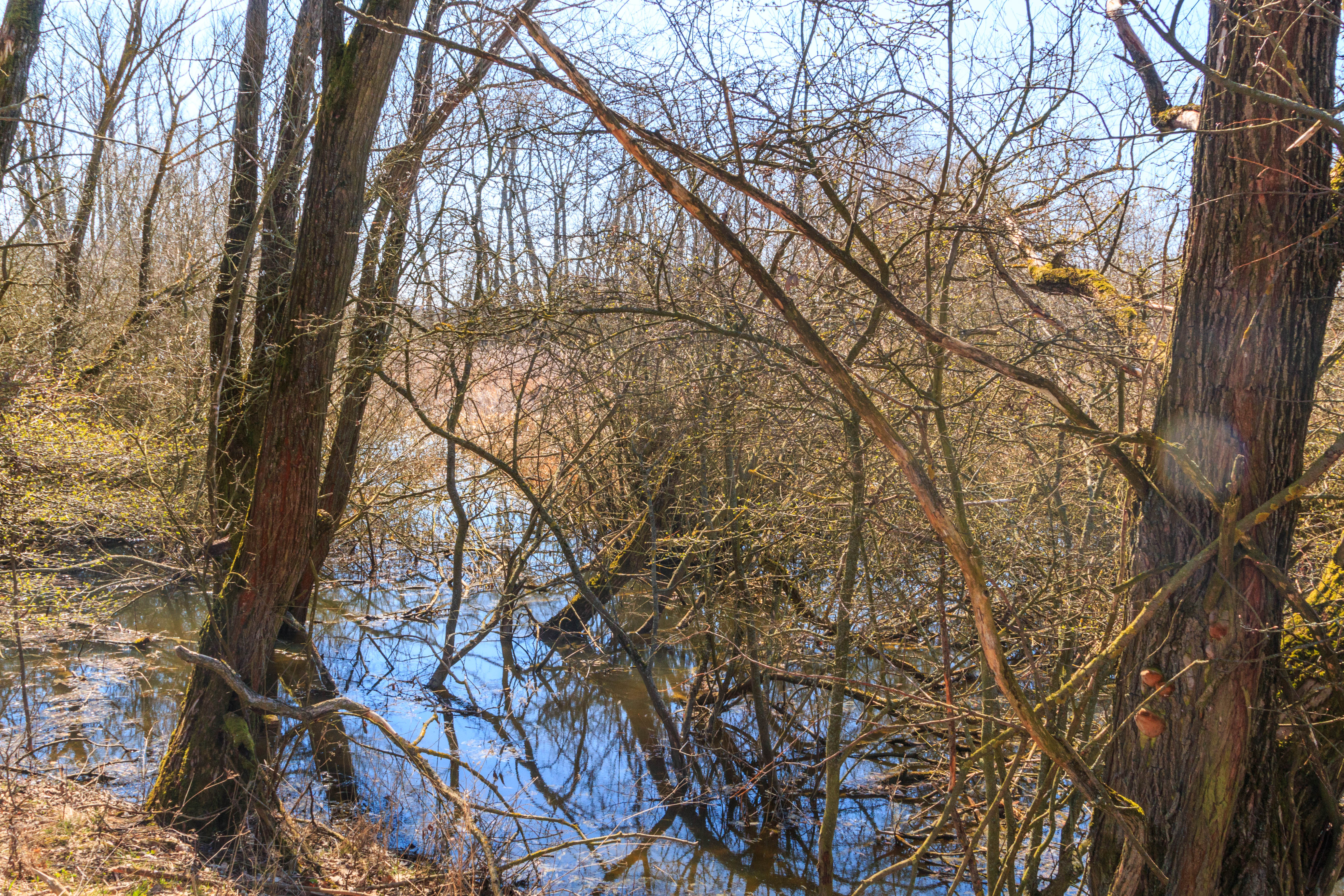 zarostlý rybník Malý Lhoták u Starých Nechanic Project: Vodstvo.